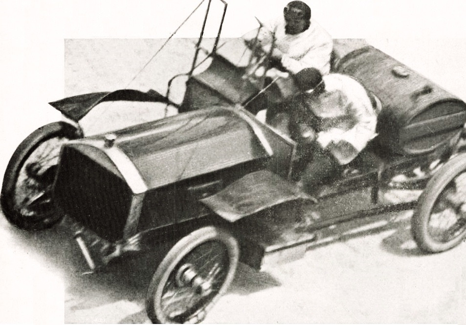 S.F. Edge lors de son record du monde des 24 heures sur Napier 60HP en 1908 - La Vie au Grand Air du 2 janvier 1909, p.3